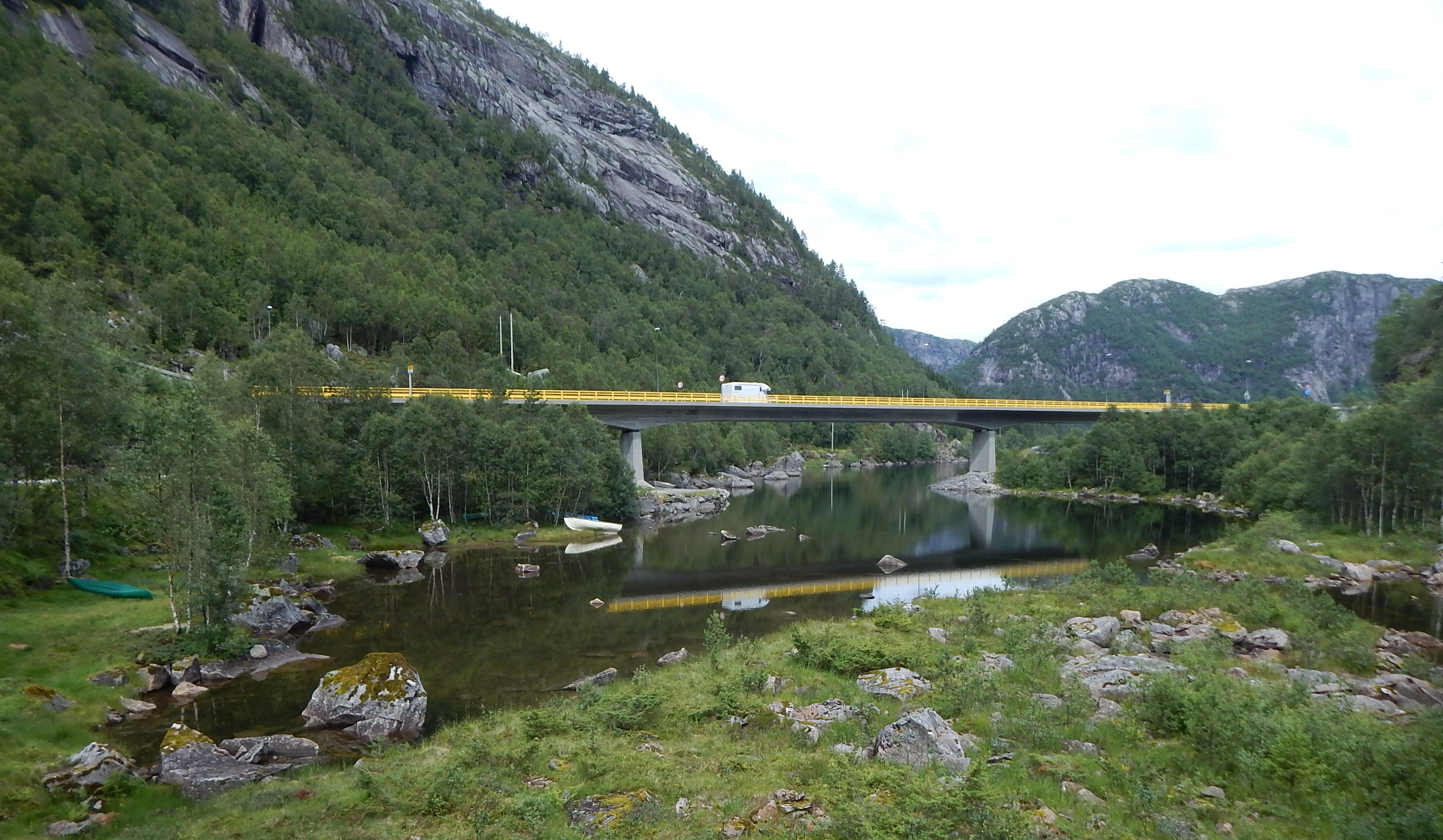 Storavatn bru fører E39 over Haugsdalselva.